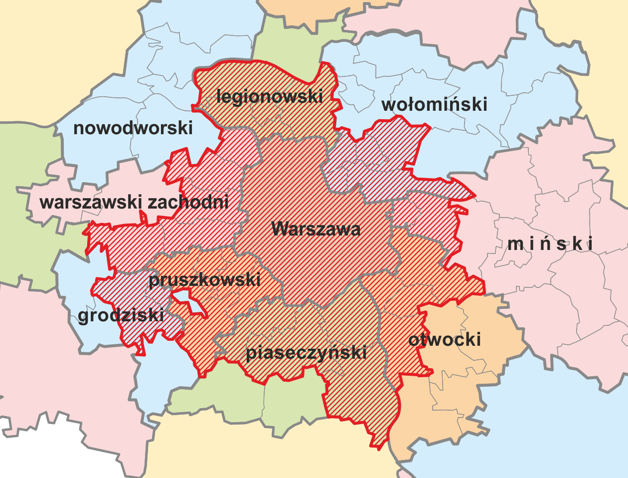 Powiat metropolitalny Warszawa zgodnie z poselskim projektem ustawy o ustroju miasta stołecznego Warszawy z dnia 30 stycznia 2017 roku